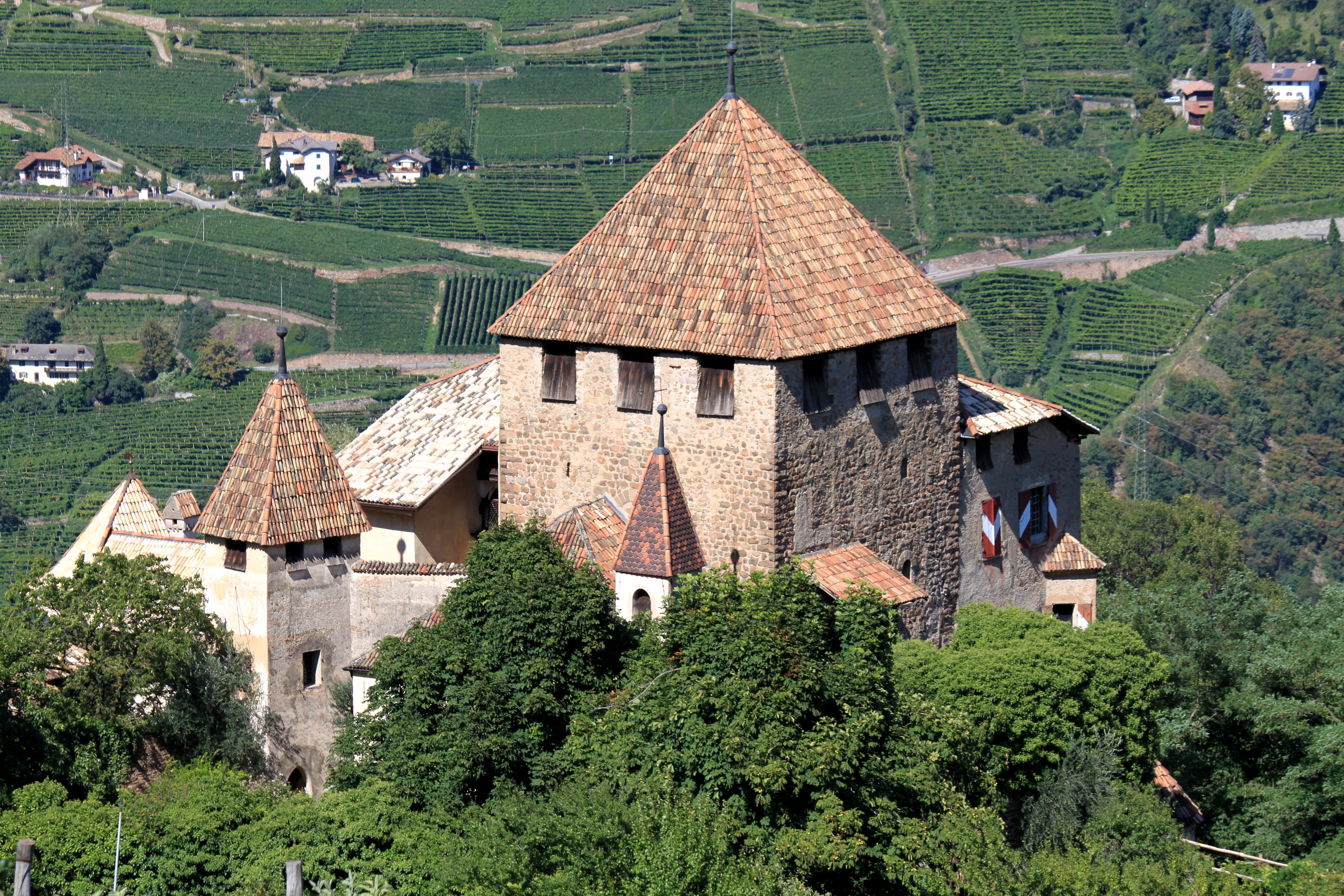 Burg Kampenn bei Bozen (Südtirol)